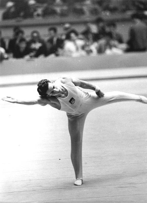 Zentralbild-AP-Radiofoto Tre-Zi 21.10.1064 XVIII. Olympische Sommerspiele Tokio 1964. Im Tokio-Gymnasium erkämpfte sich die kombinierte Turnriege DDR-Westdeutschland am 20.10.1064 im olympischen Zwölfkampf eine Bronzemedaille. In der Einzelwertung belegte der DDR-Sportler Klaus Köste (SC DHfK Leipzig) einen beachtlichen 18. Platz.